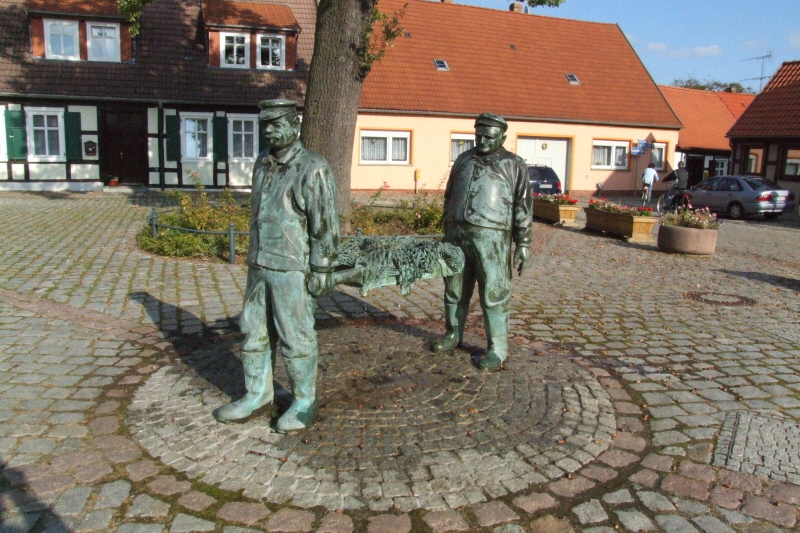 Fischerbrunnen in Arneburg, artist:Karolin Donst